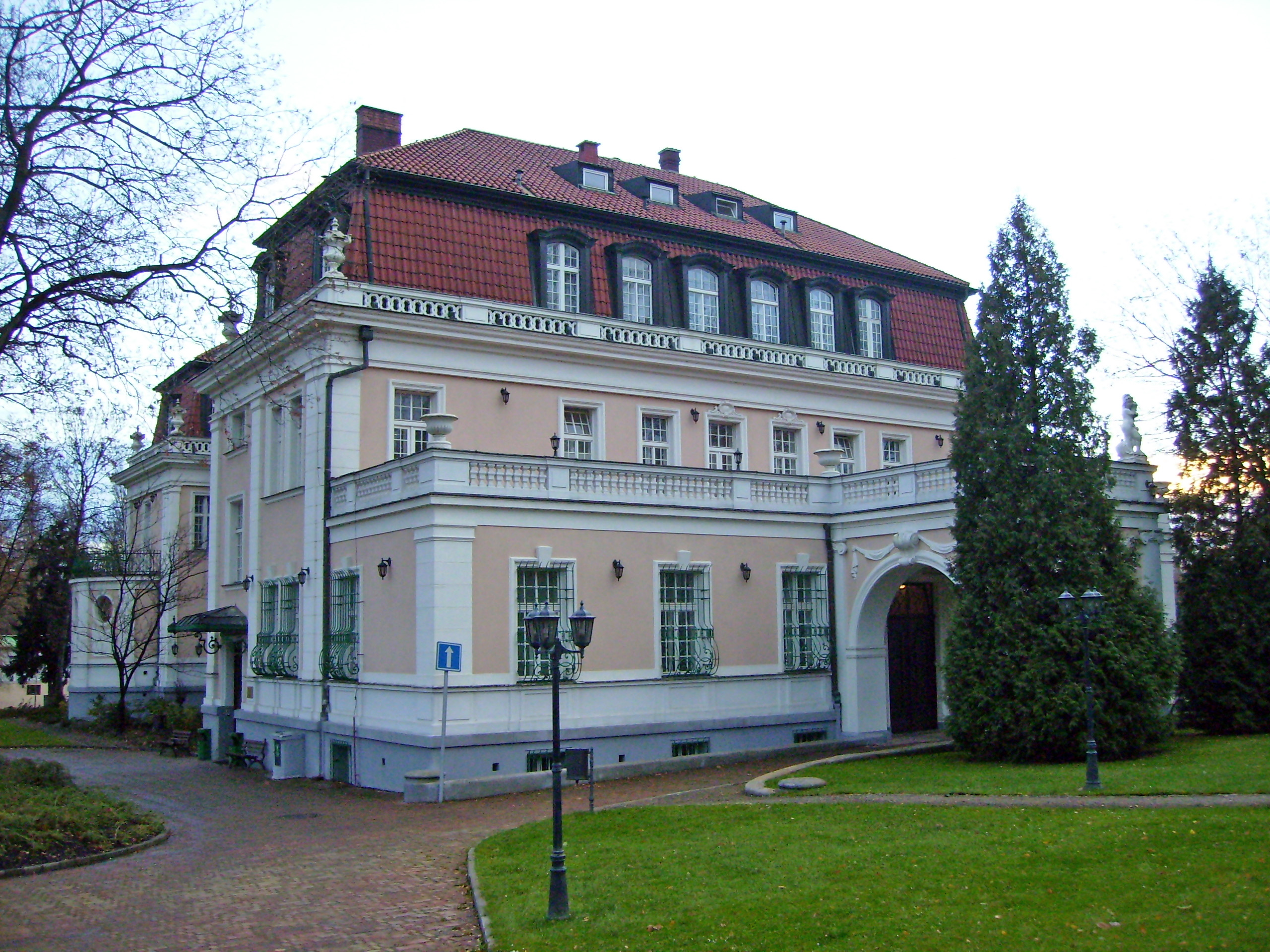 Česky: Grabova vila v Praze 8-Libni